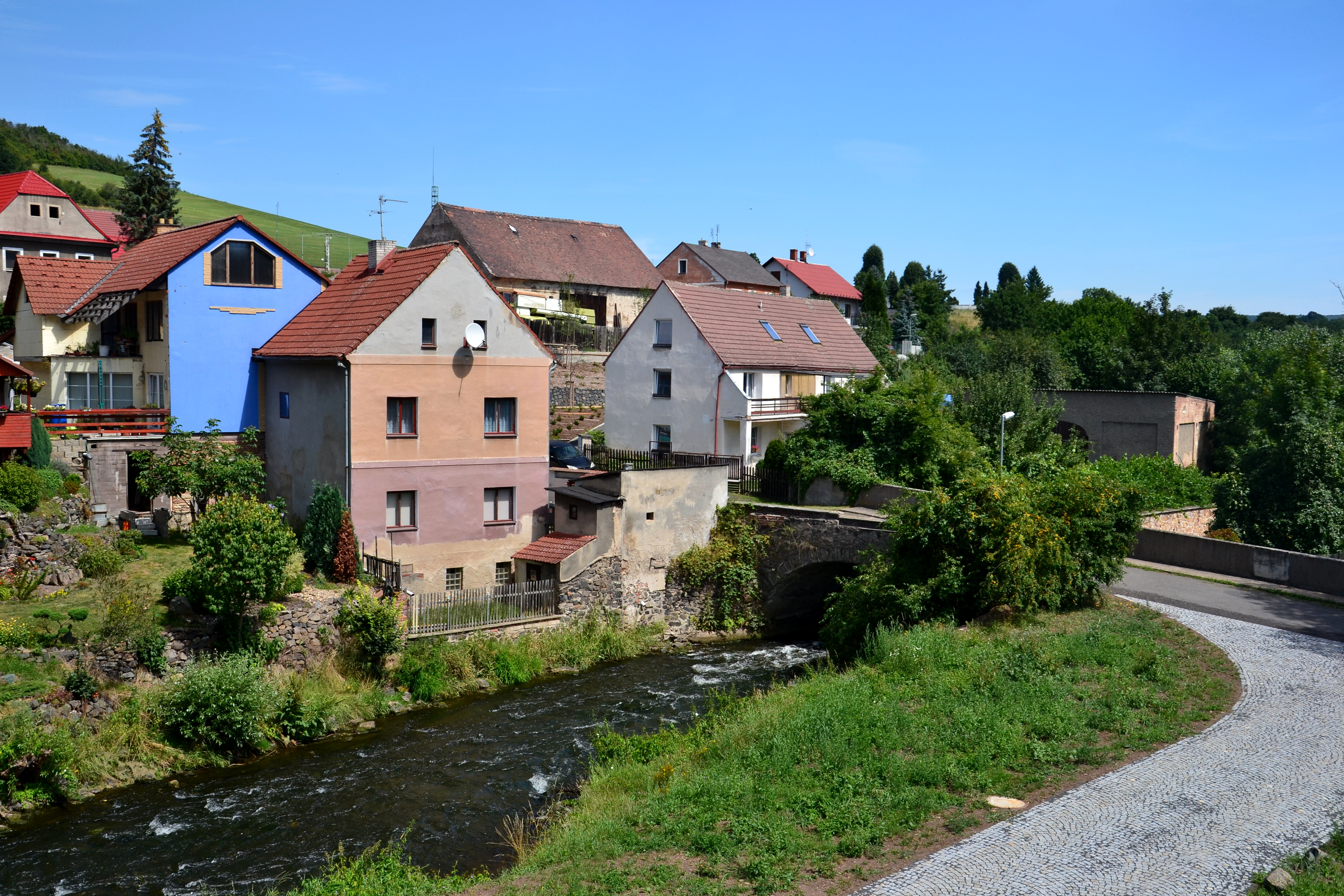 Nábřežní část vesnice